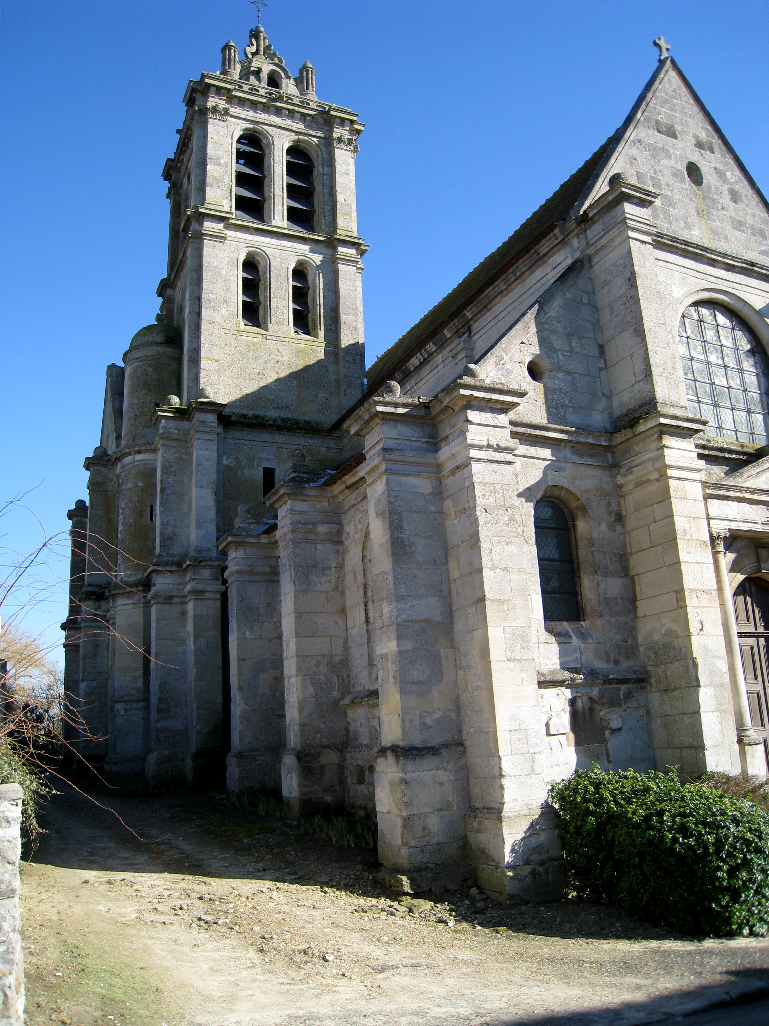 Façade ouest de l'église d'Epiais-Rhus